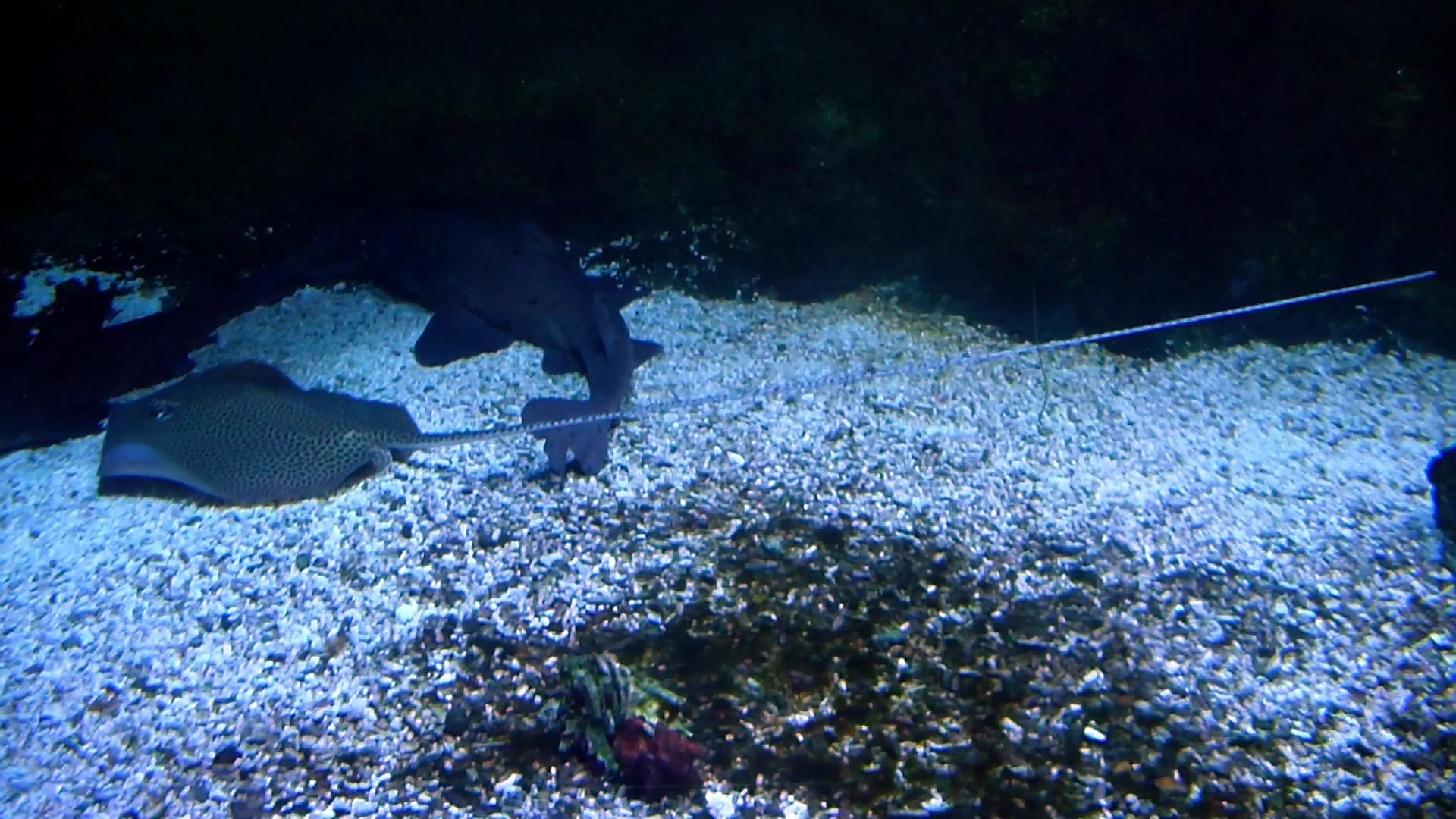 Honeycomb stingray (Himantura uarnak)